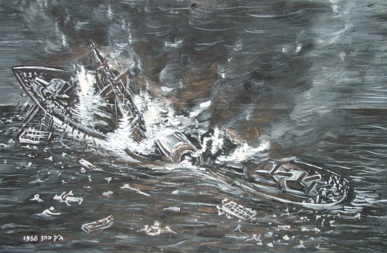 ציור של המשחתת אילת טובעת של ג'קי כהן לפי תאורו של משה לוי בספר הנשמה ה-48